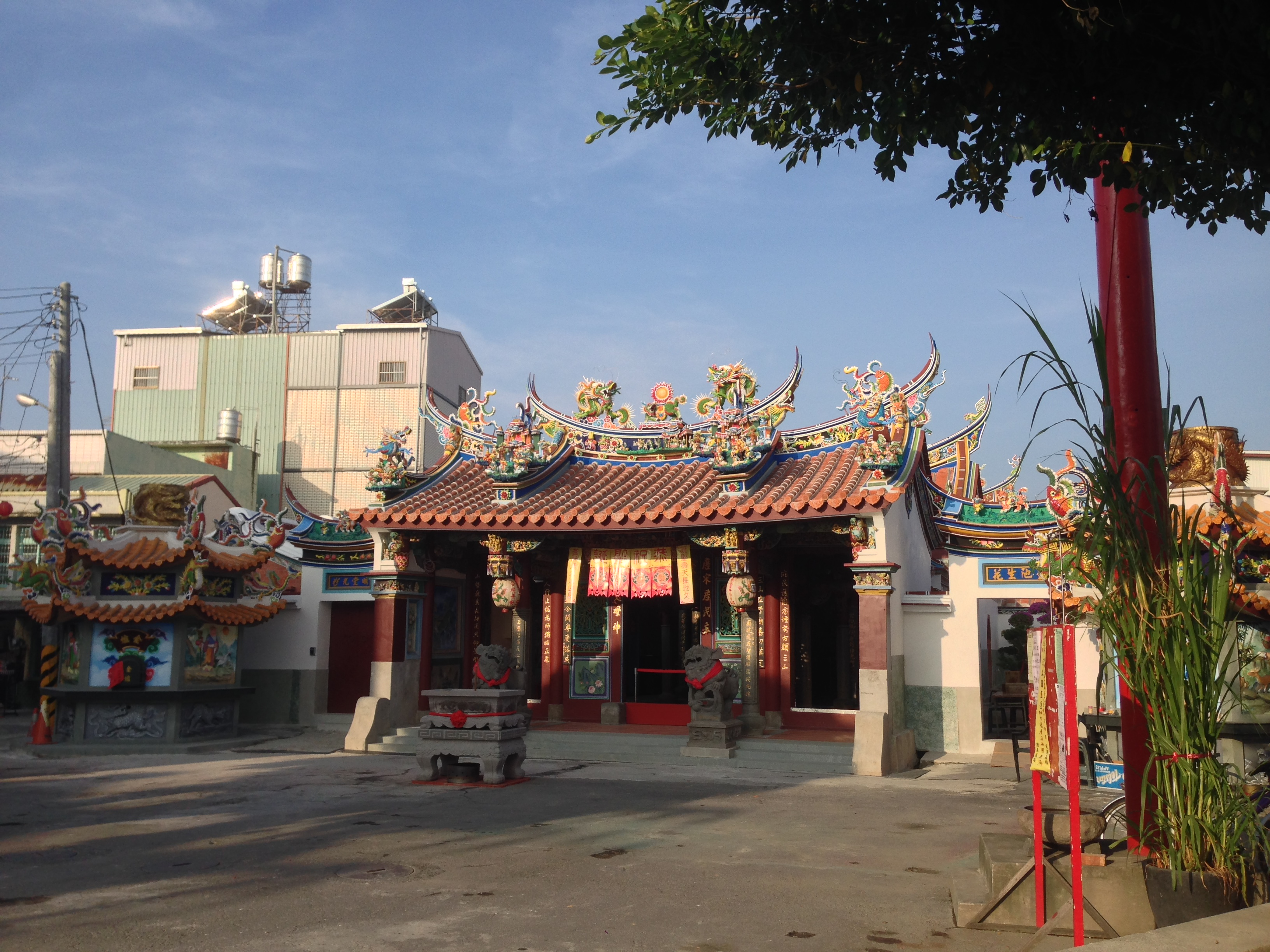 九如三山國王廟一景